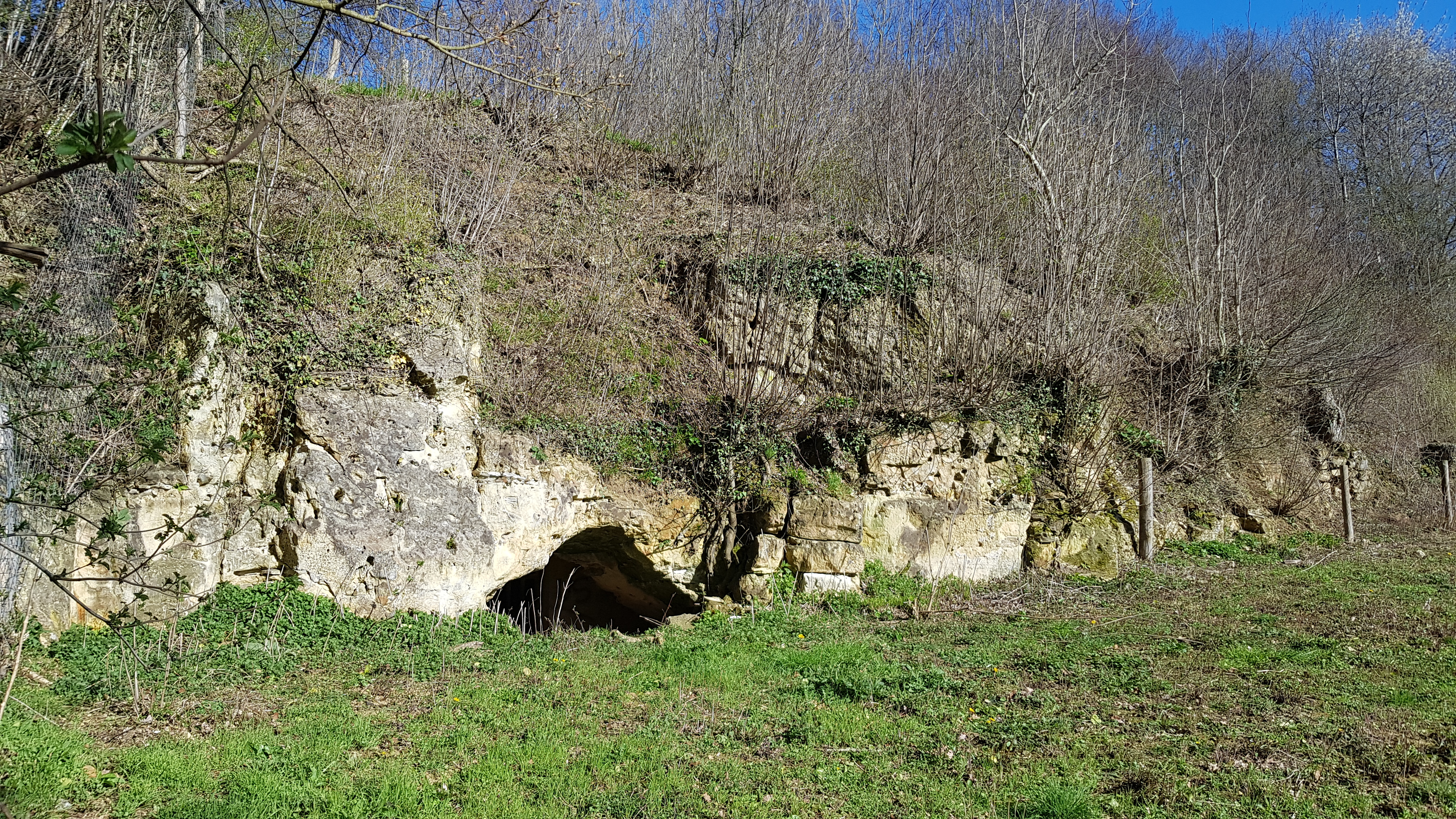 Groeve aan de Heide (Biebosch), Valkenburg, Nederland